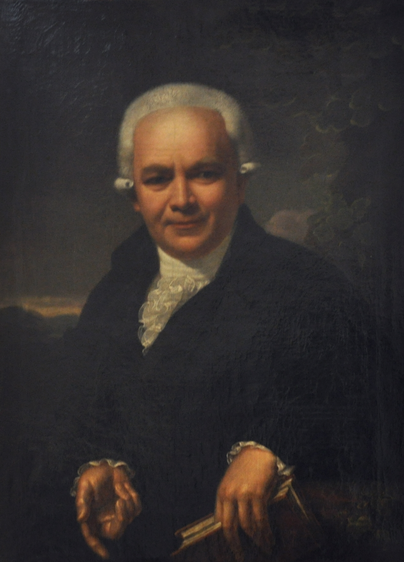 Karl Wilhelm Dassdorf, Bibliothekar in Dresden; Gemälde im Treppenhaus der SLUB Dresden; Öl auf Leinwand; vermutlich identisch mit WVZ-Gemälde V 3: Porträt des Bibliothekars Tesdorf, 1802 Öl/Lw. Ausgeführt in Dresden Verbleib unbekannt